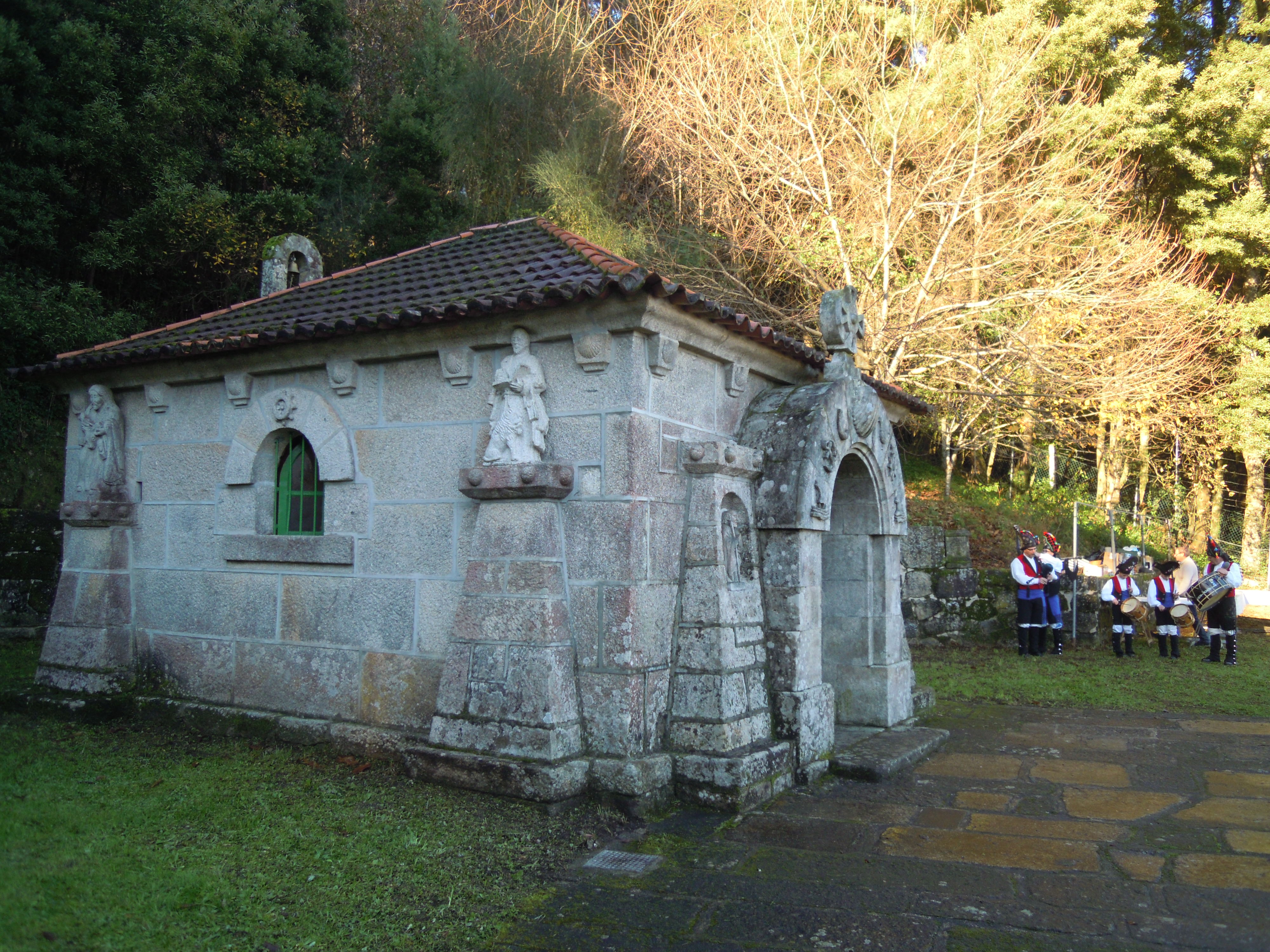 Capela dos Santos Reis do Valado (Bueu)